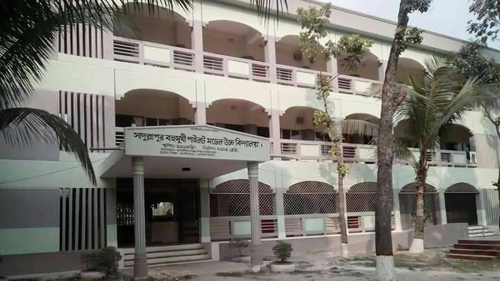 সাদুল্লাপুর মডেল বহুমুখী পাইলট উচ্চ বিদ্যালয় গাইবান্ধা জেলার পুরাতন স্কুল গুলোর মধ্যে একটি অন্যতম স্কুল।